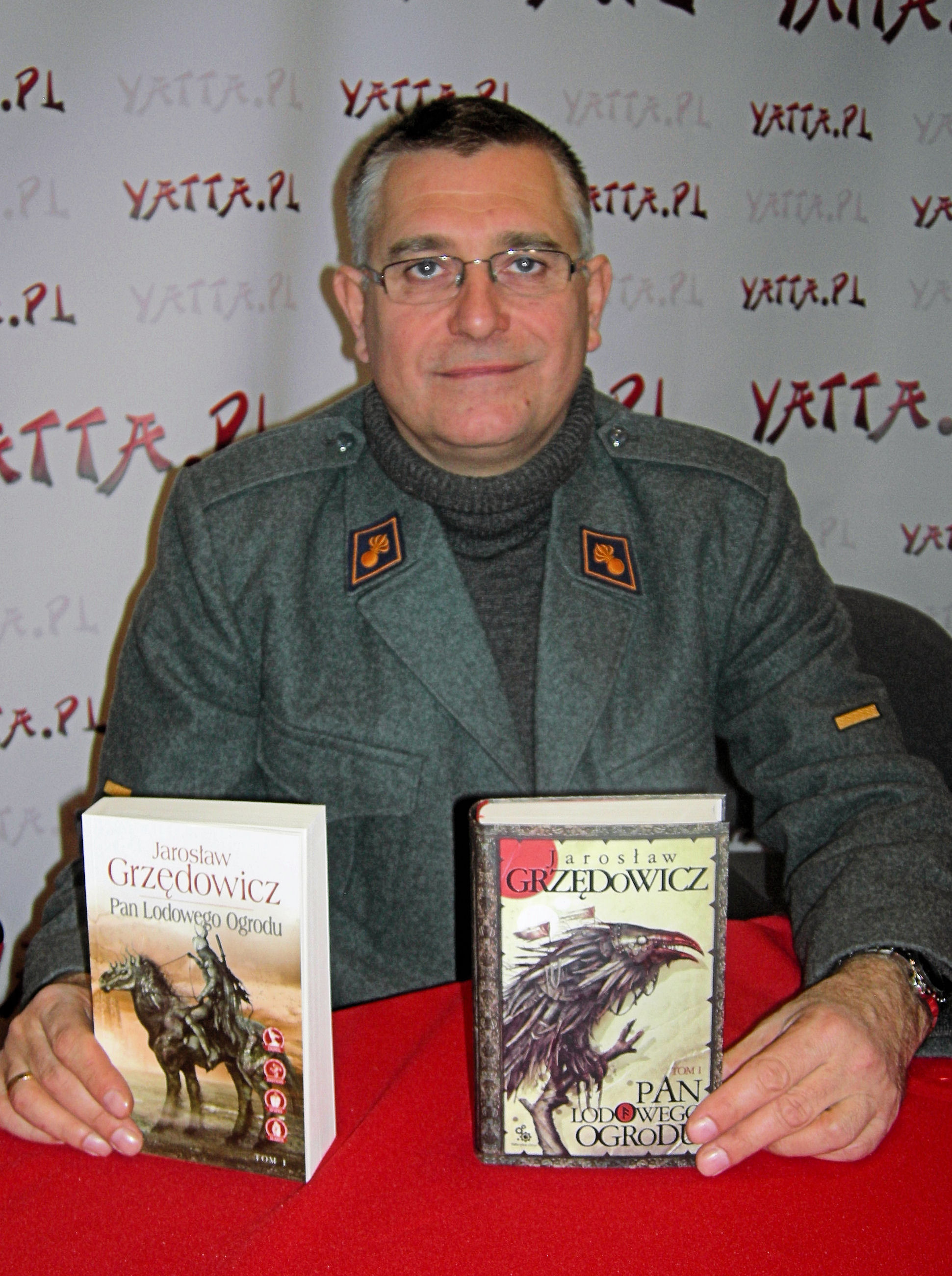 Jarosław Grzędowicz na Festiwalu Fantastyki Pyrkon 2014